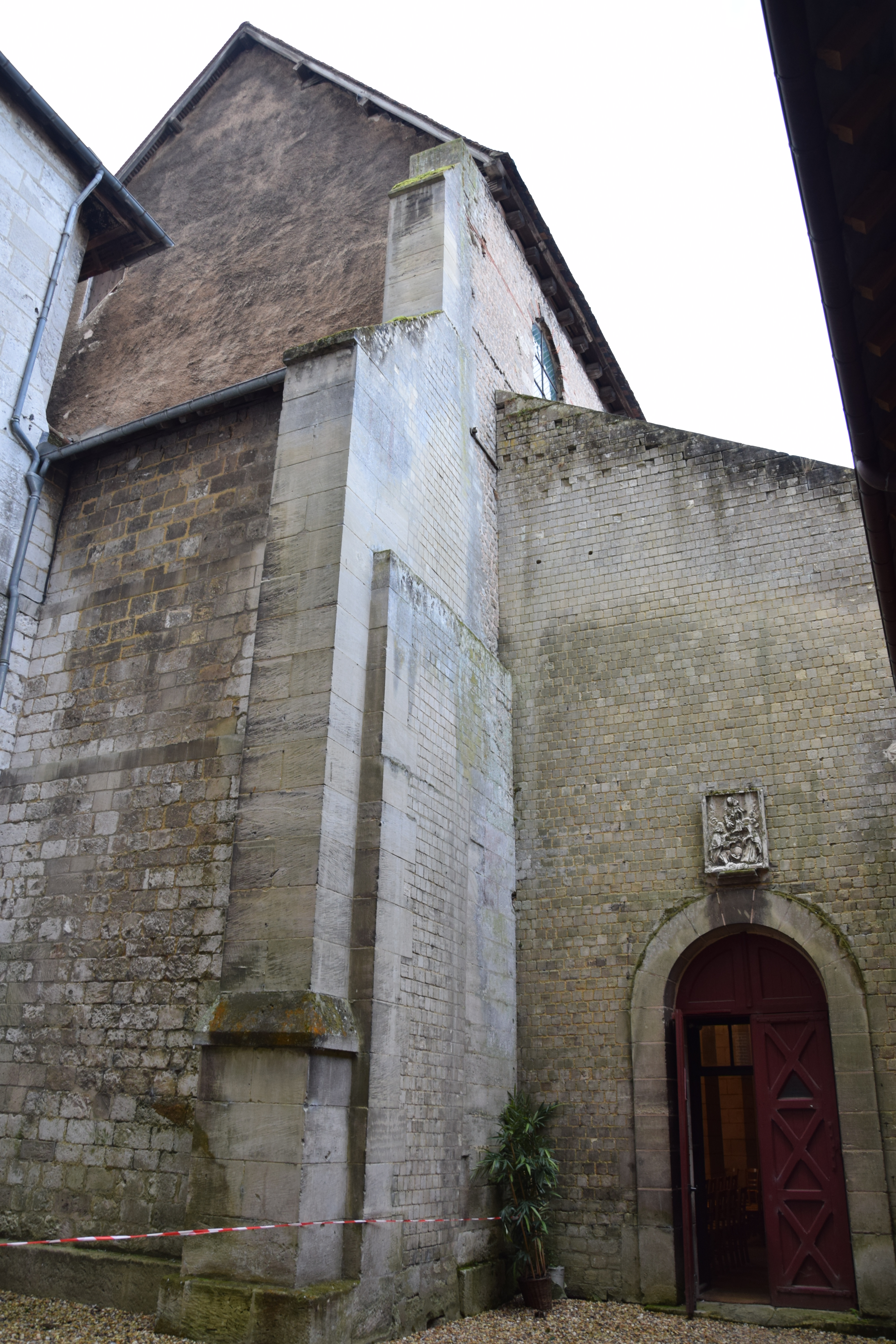 Église Notre-Dame-de-la-Basse-Œuvre de Beauvais